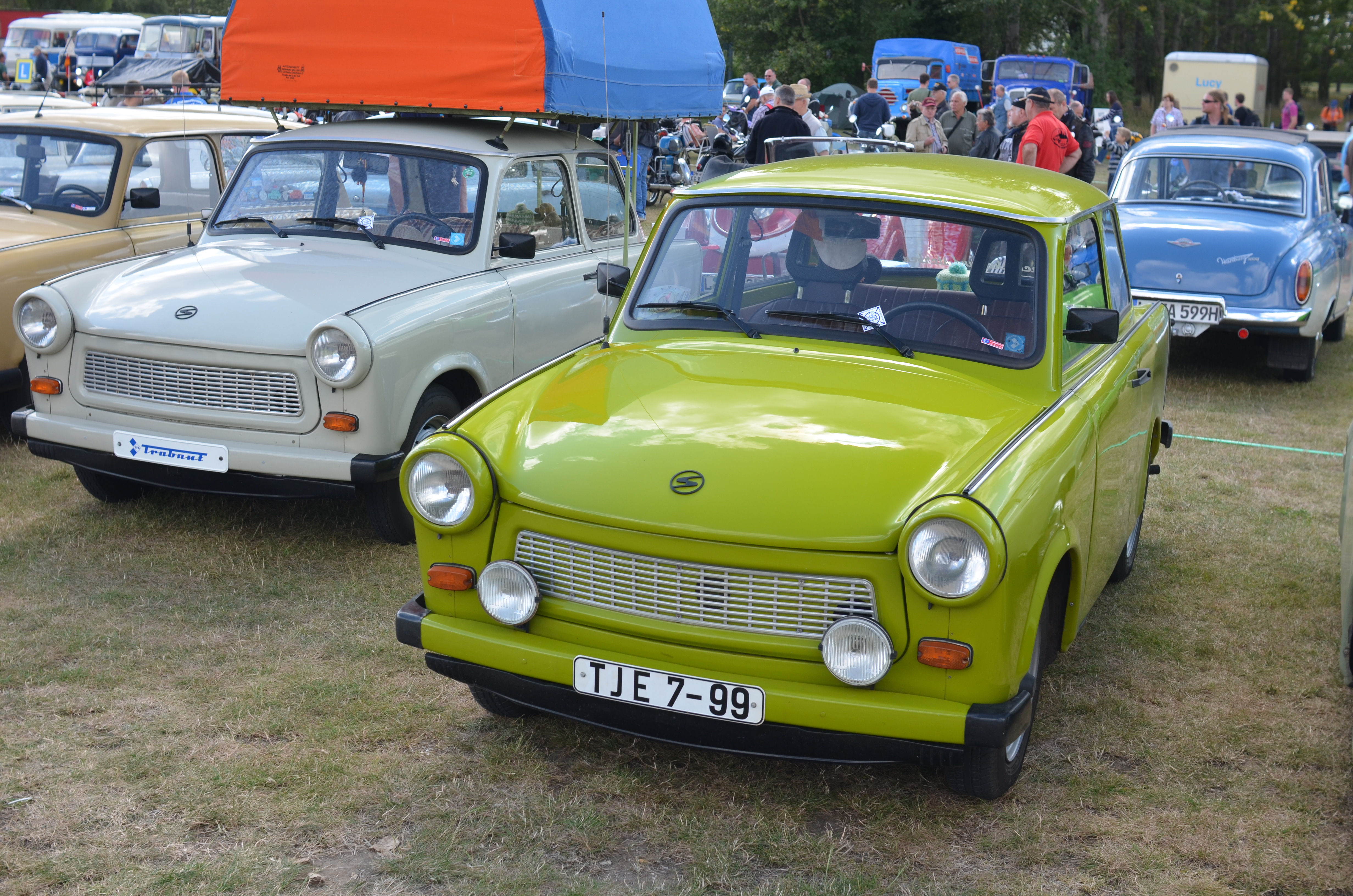 Trabant